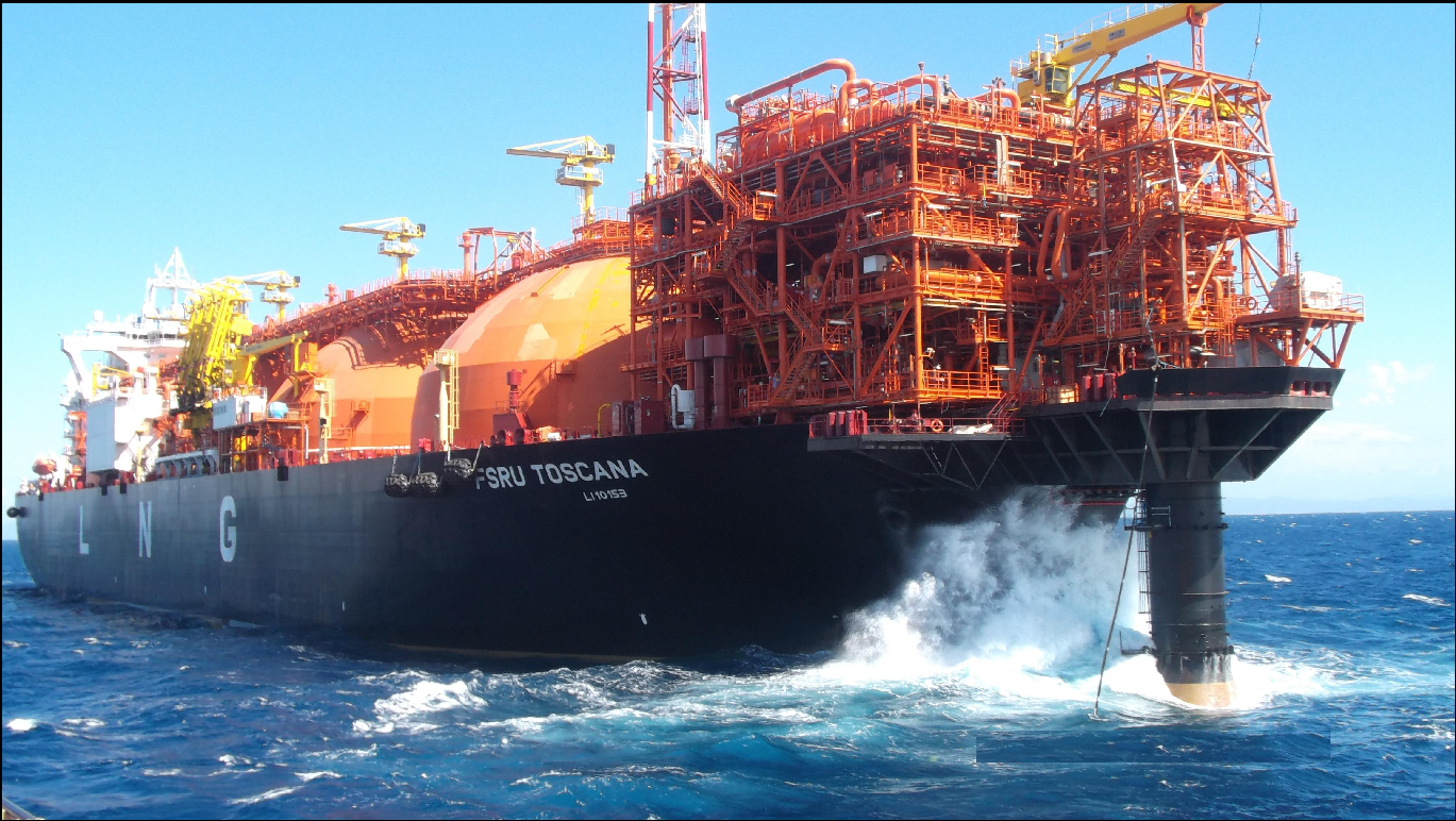 Fsru Toscana ancorata